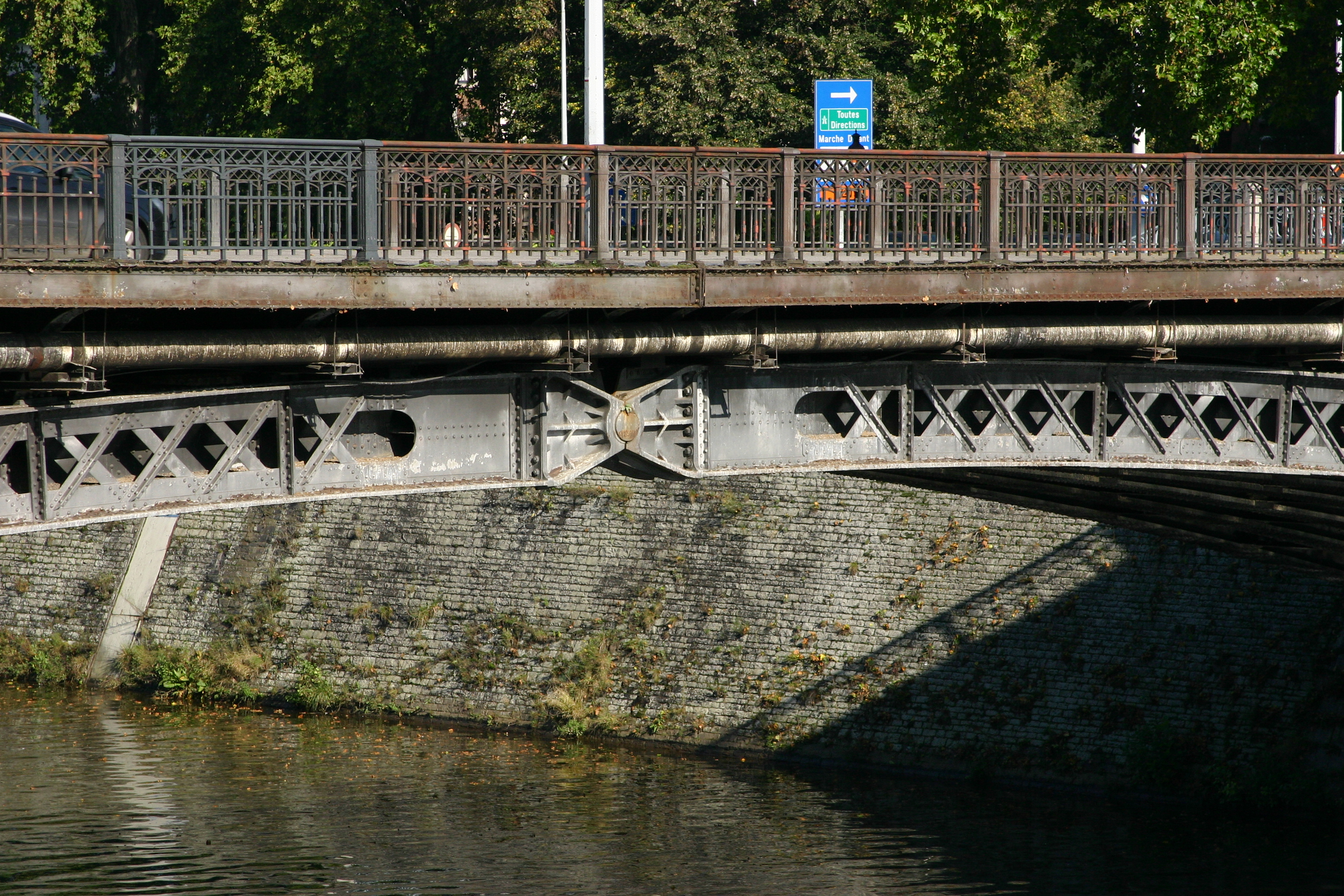 Pont de Fetinne Mëttelstéck.